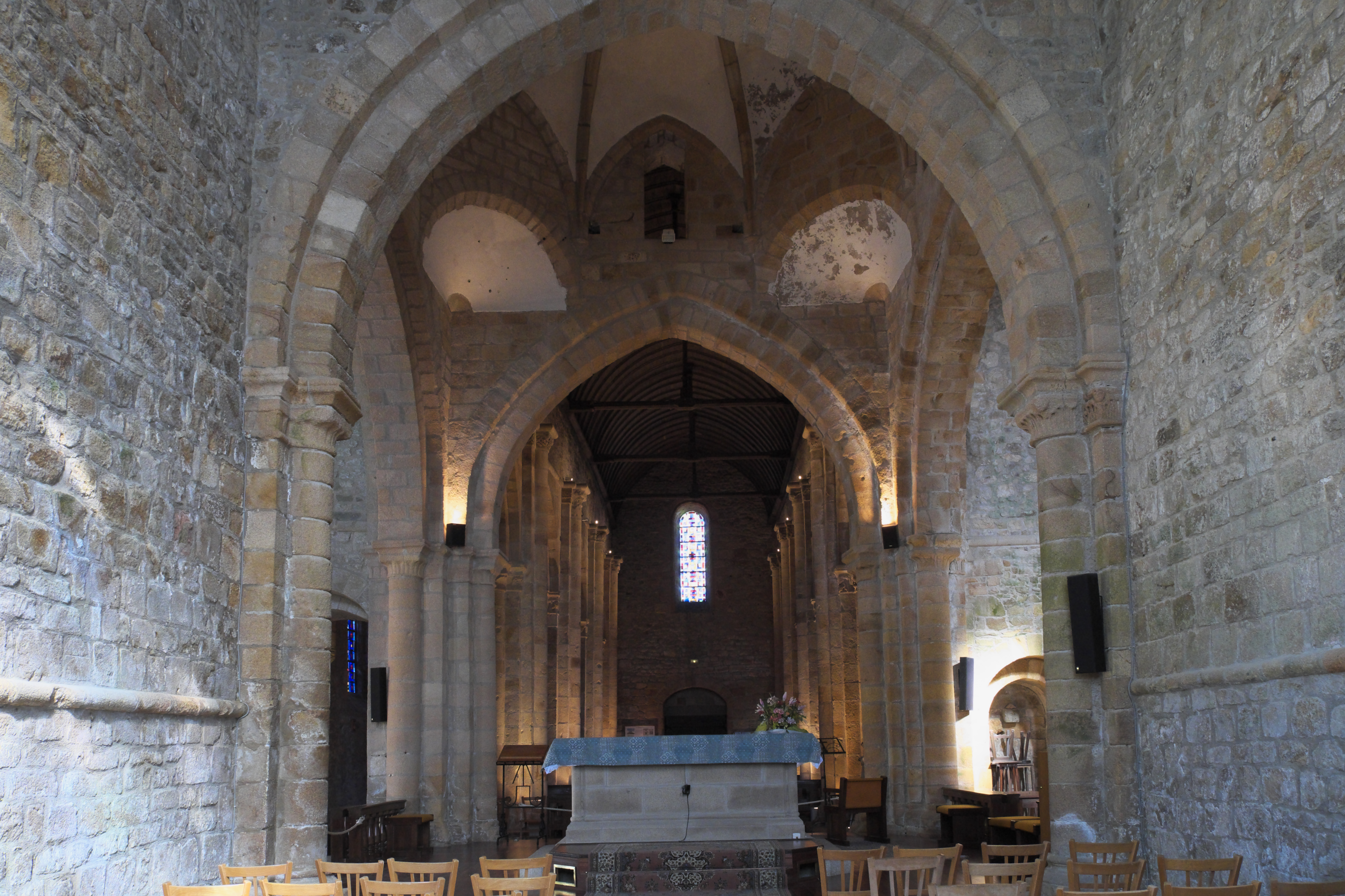 Kirche Notre-Dame-de-Joie in Merlevenez im Département Morbihan (Region Bretagne/Frankreich)